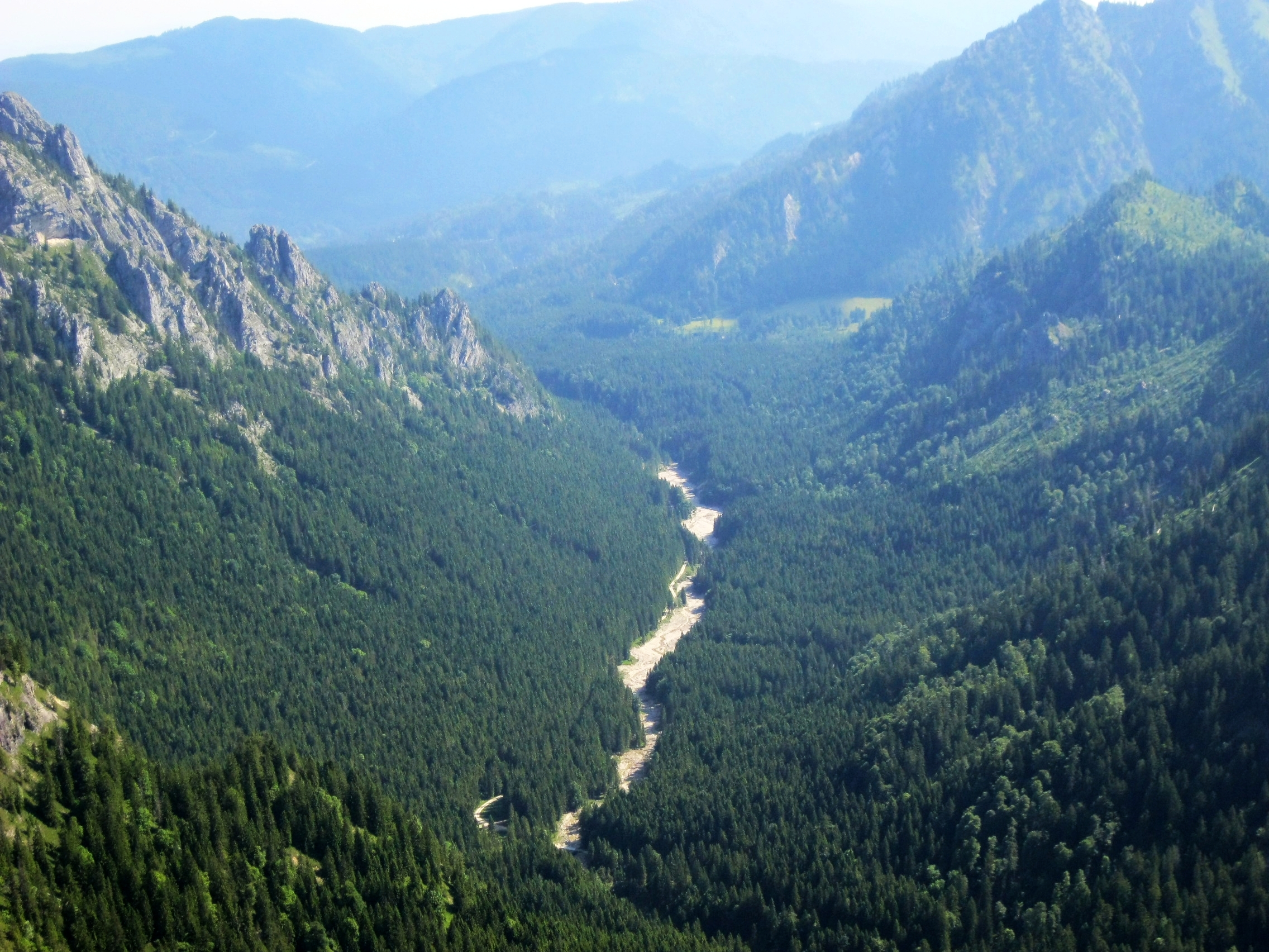 Ansicht des Lobentals in den Ammergauer Alpen - Standort auf der Ahornspitze